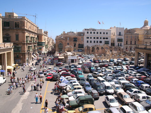 Alter Bahnhof von Valletta mit Republic Street und Ruine der Oper